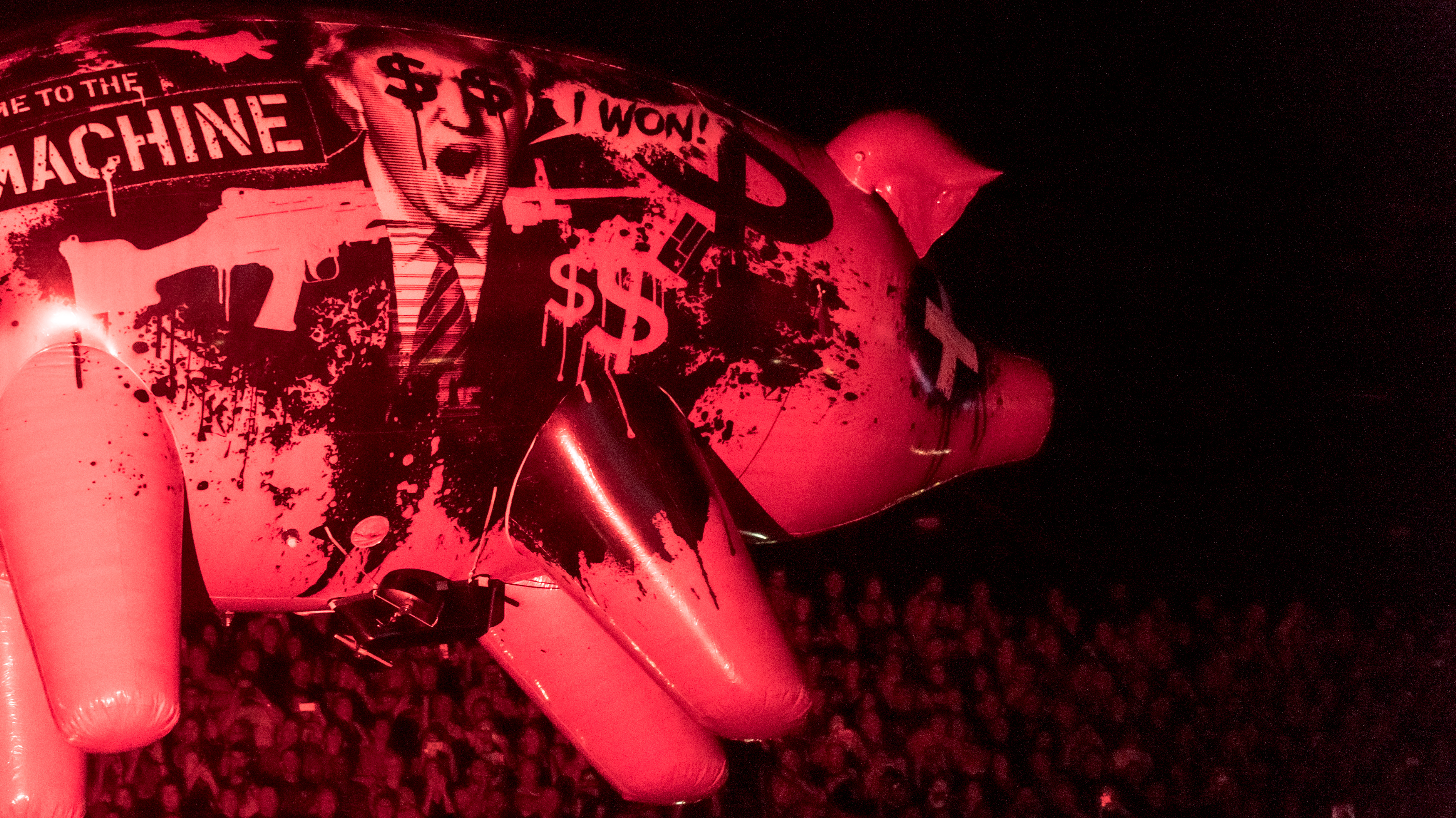 RogerWatersNZ240118-19